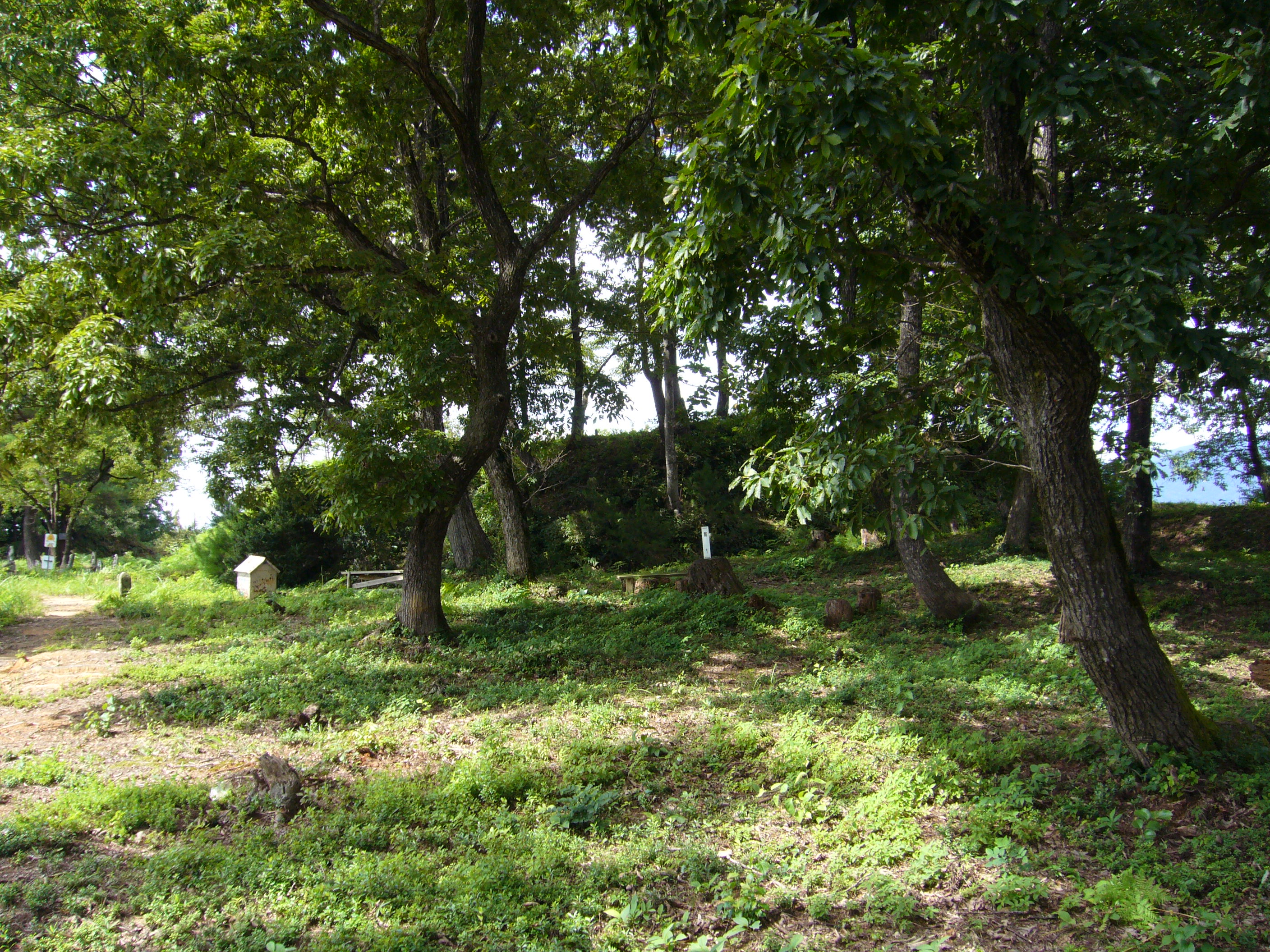 山頂入口より郭1、及び奥の主郭を望む